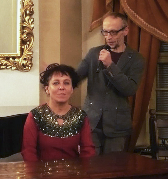 Olga Tokarczuk i Mietek Kowalcze w Kłodzku, 20.10.2016 r.